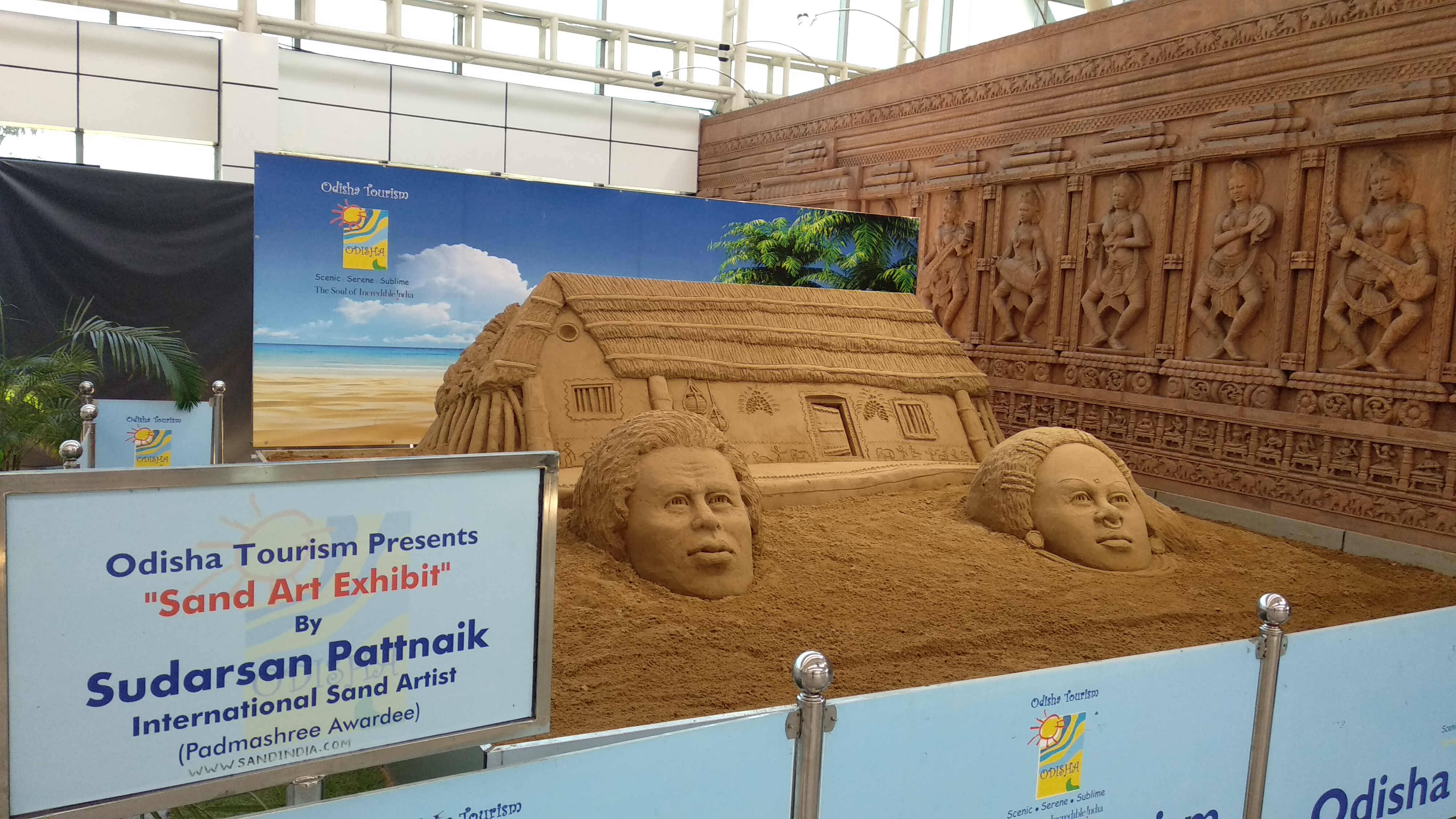 ଓଡ଼ିଆ: ସୁଦର୍ଶନ ପଟ୍ଟନାୟକ କଳାକୃତି